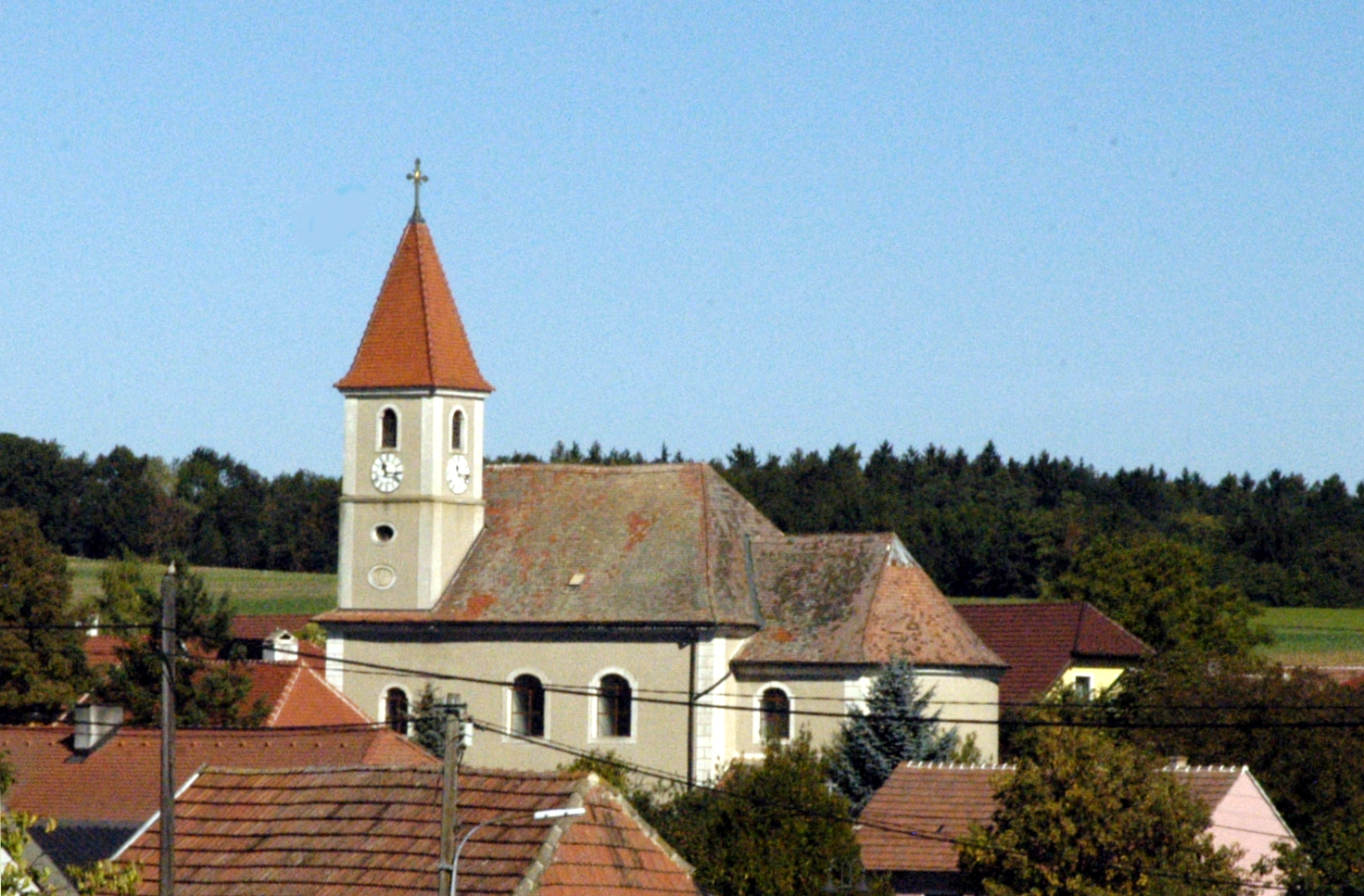 katholische Pfarrkirche heiliger Jakobus der Ältere in Eggendorf am Walde, Gemeinde Maissau